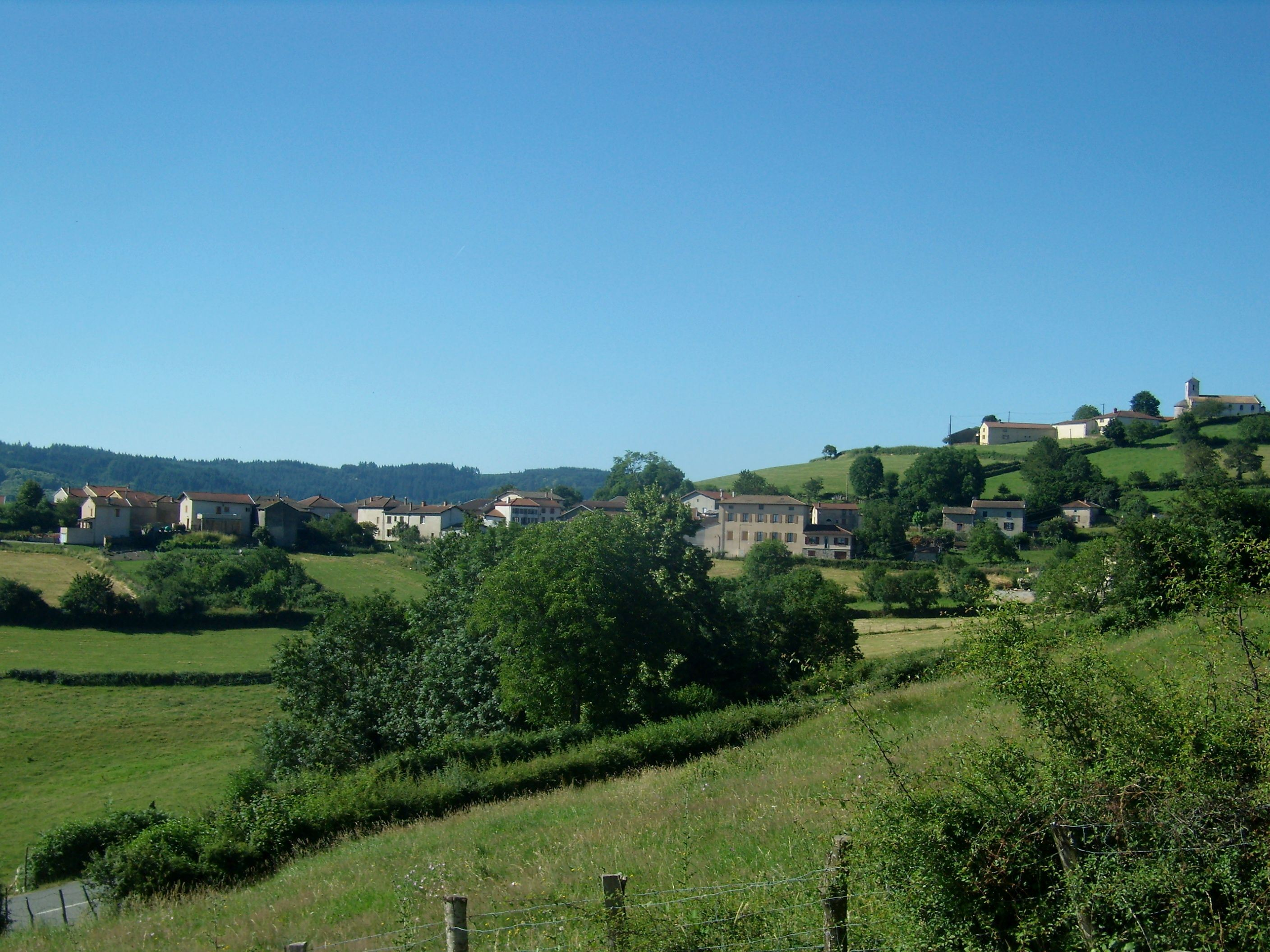 vue générale du village